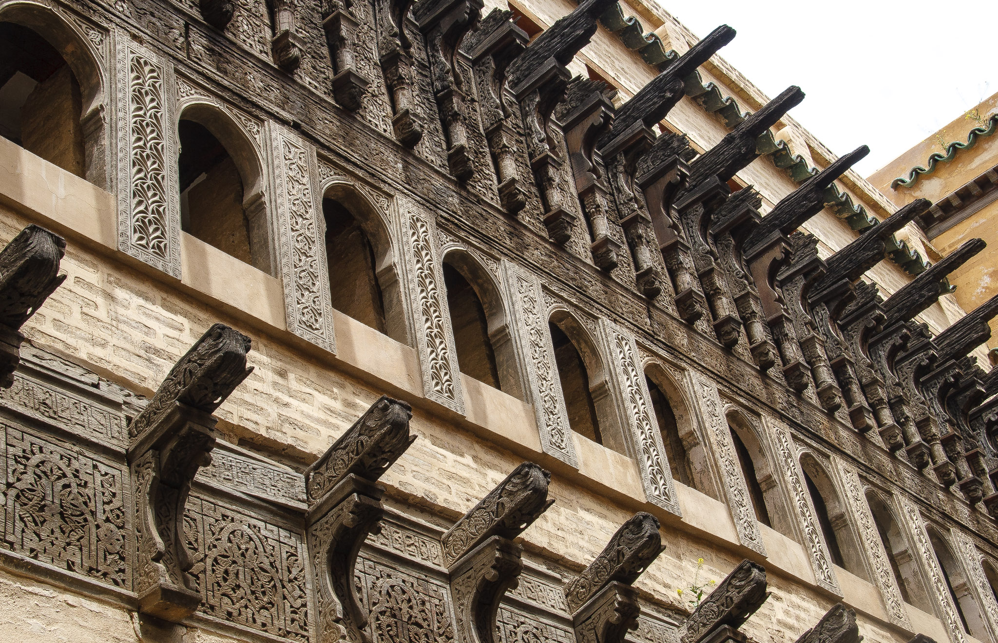 At Dar al-Magana